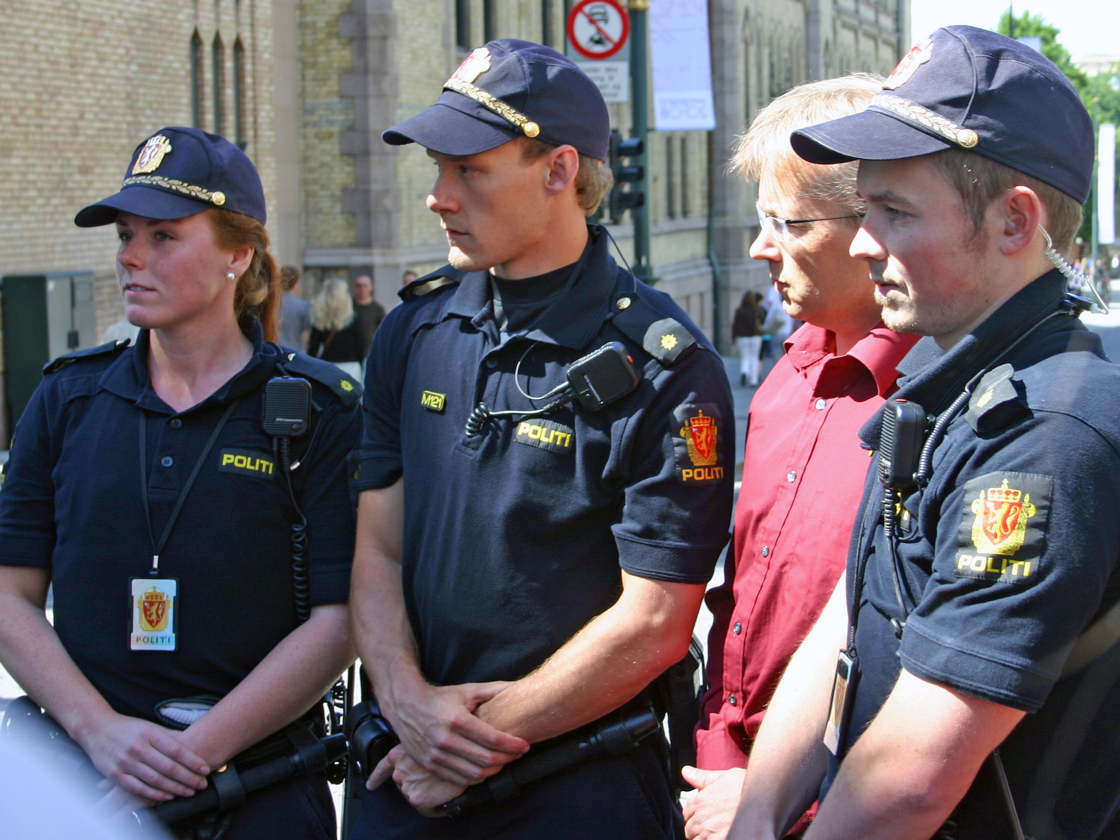 Justisminister Knut Storberget på Karl Johan sammen med politistudenter og politimesteren i Oslo.